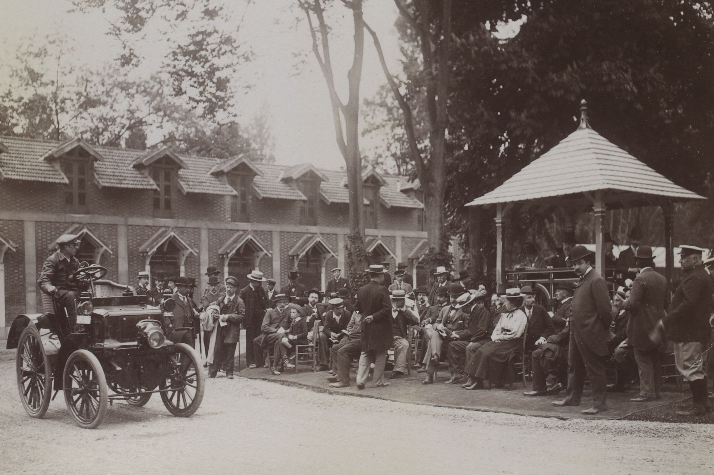 [Collection Jules Beau. Photographie sportive] : T. 15. Année 1901 / Jules Beau : F. 36. Vente d' automobiles à l'etablissement de Neuilly Saint-James, 28 mai 1901